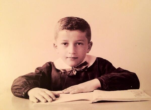 Roberto Maroni nel 1961, in prima elementare, in una foto scolastica.